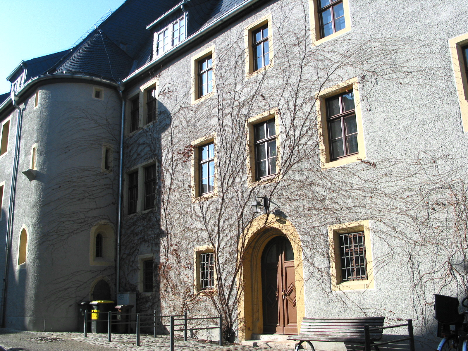 Südansicht des 1253-57 erbauten Franziskanerklosters in Weimar. Martin Luther soll hier vor seinen Reisen nach Augsburg 1518 und Worms 1521 gepredigt haben. Heute wird es von der Hochschule für Musik „Franz Liszt“ genutzt.